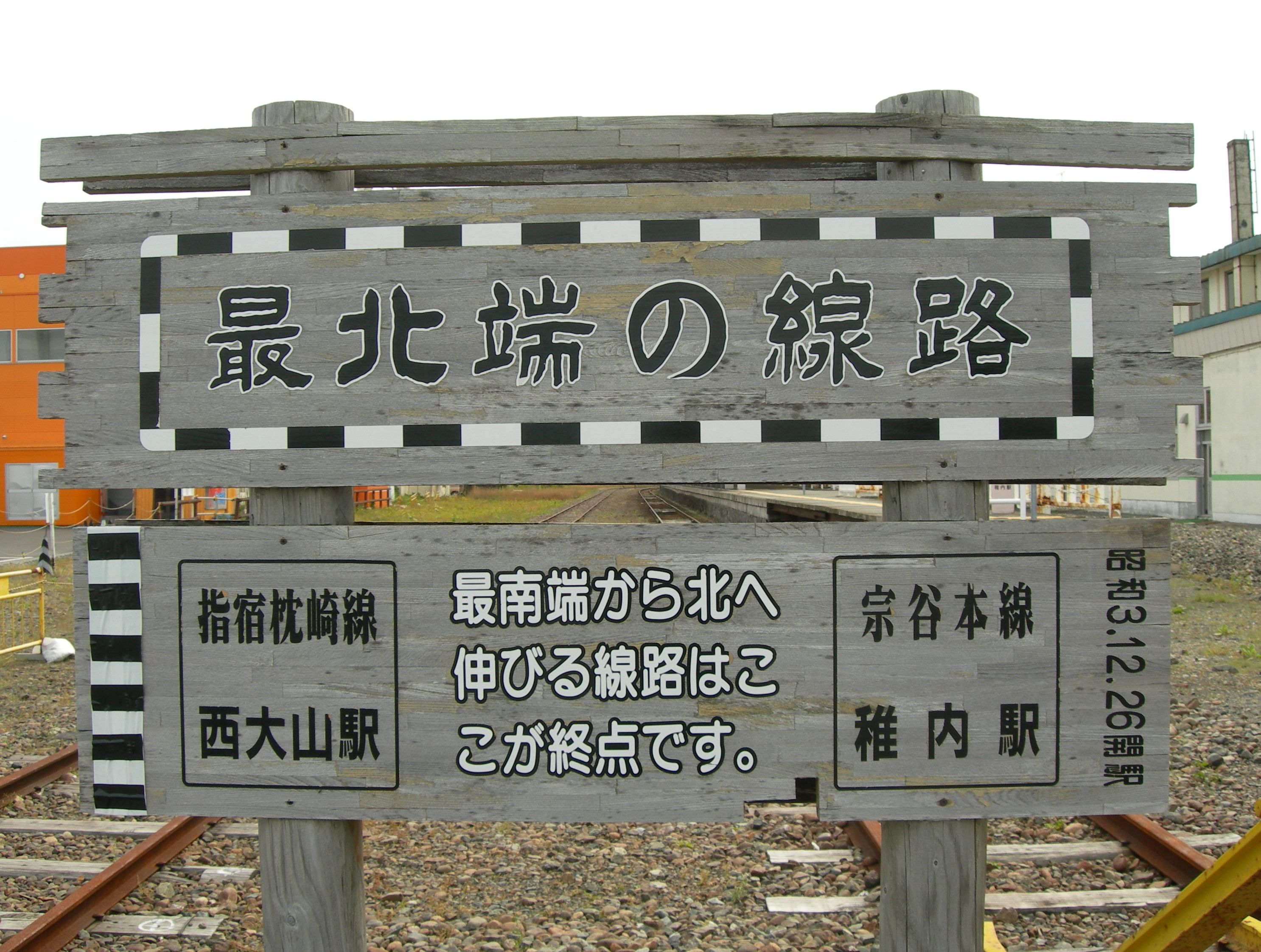 稚内駅にある日本の鉄道最北端の看板